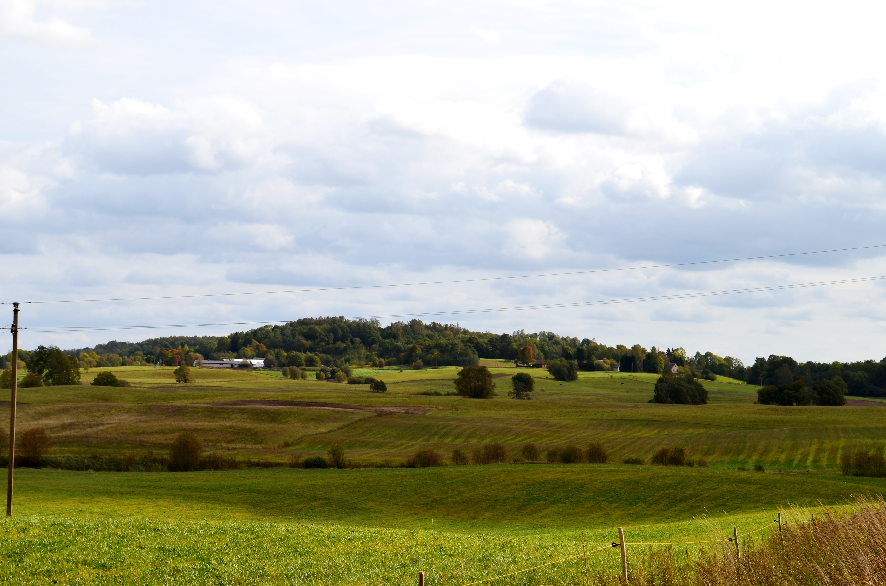 Girgždūtės kalnas iš vakarų, Telšių raj.